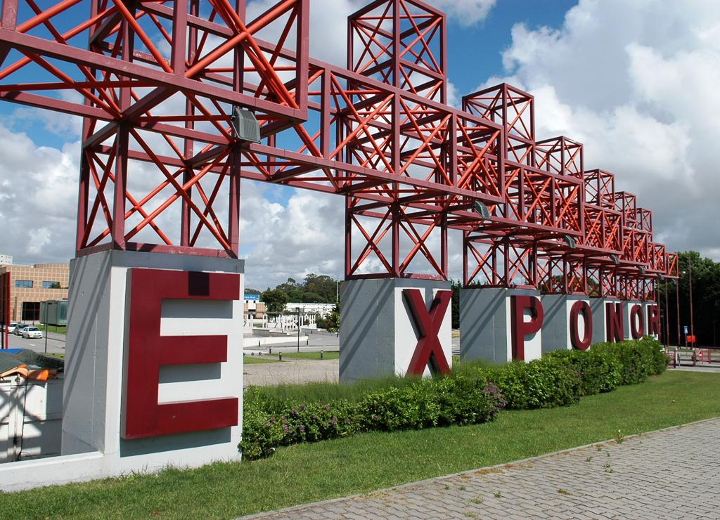 Exponor-Porto International Fair venue in Matosinhos, near Porto, Portugal